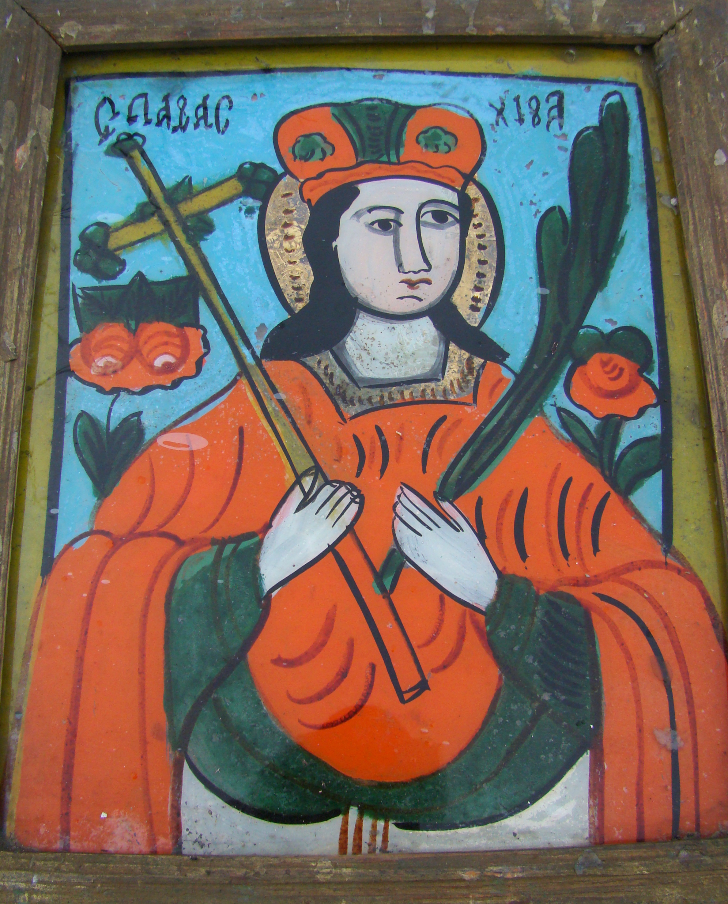 Biserica de lemn „Înălţarea Sfintei Cruci" din Pruneni